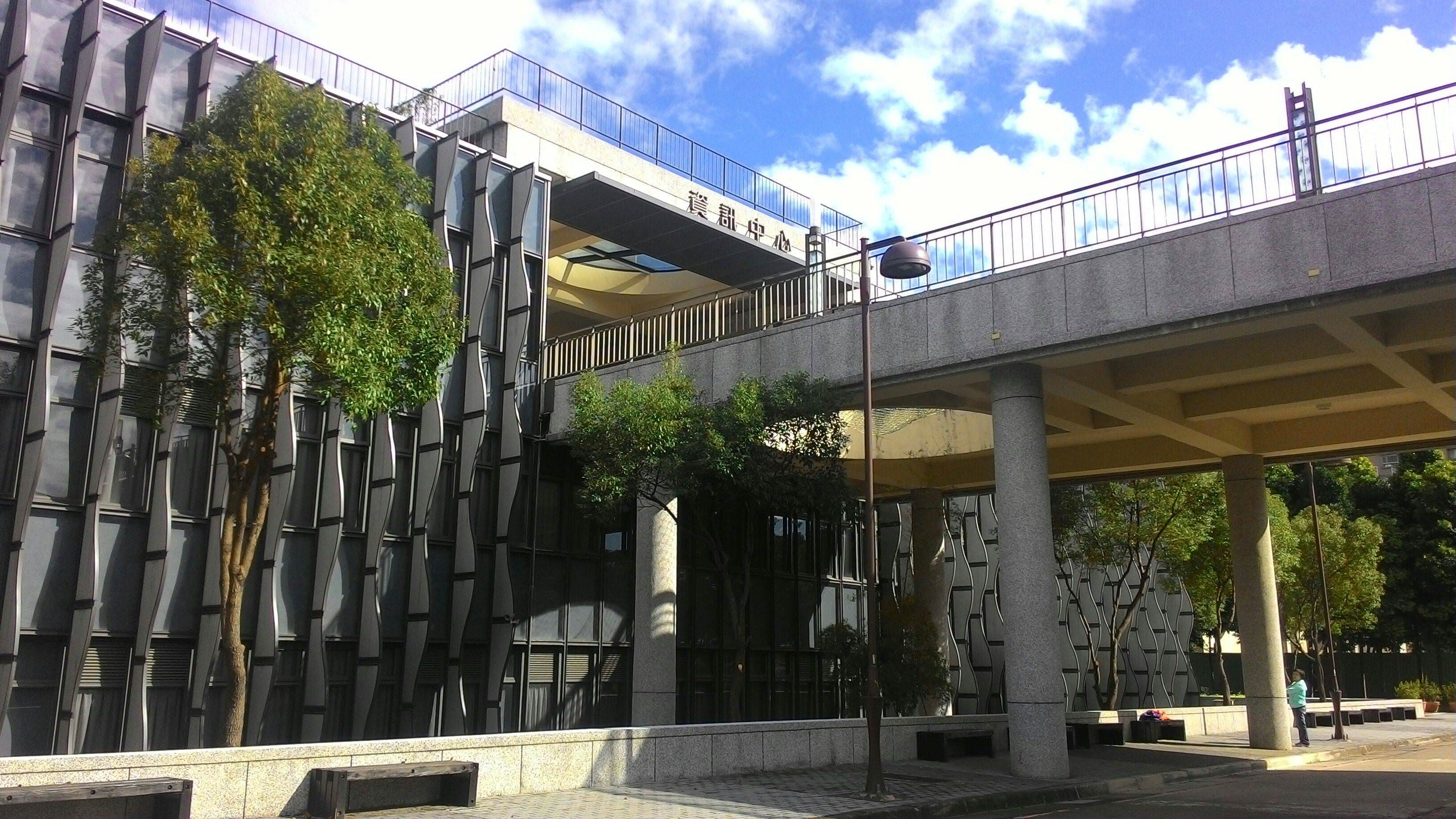 中文（台灣）: 國立臺北大學三峽校區資訊中心大樓